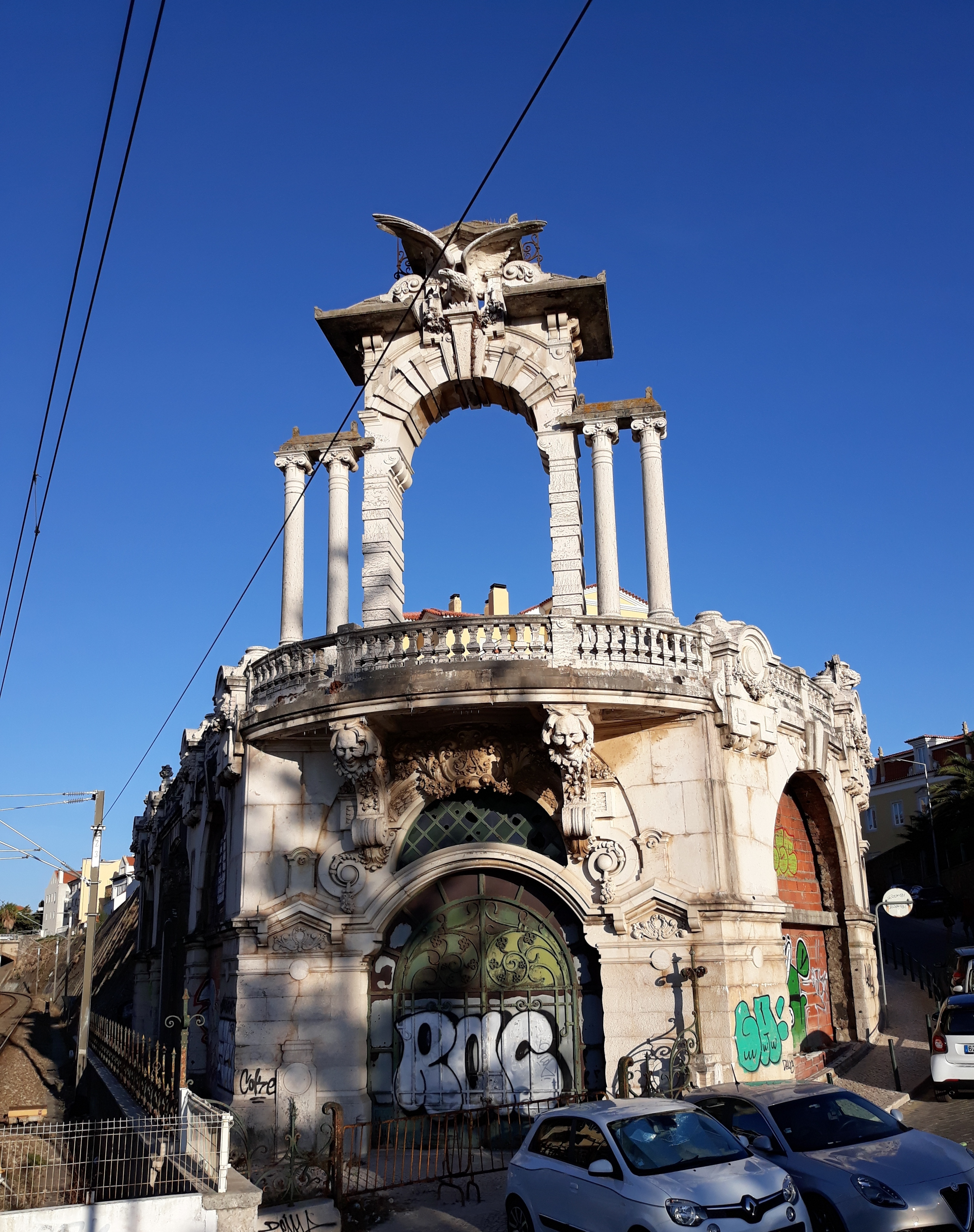 Cocheiras de São Jorge no Estoril